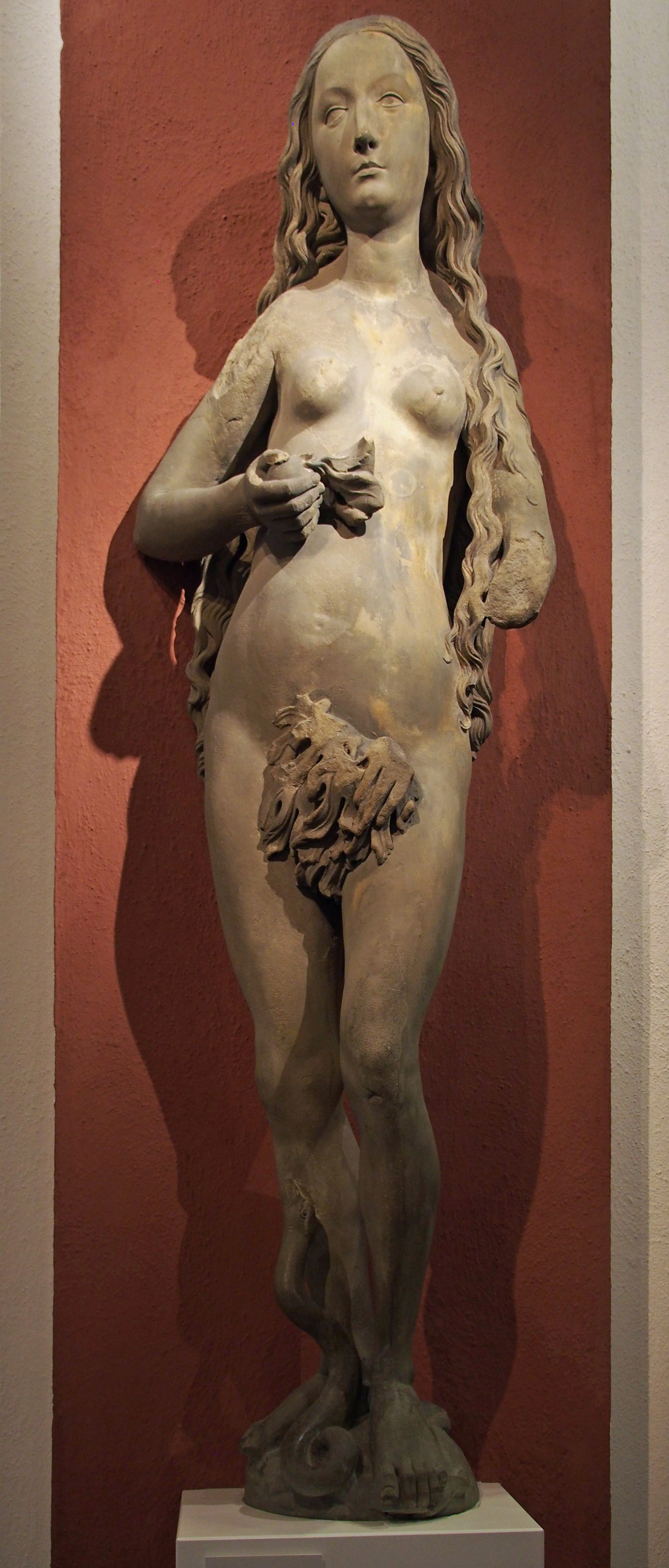 "Eva" Sandsteinfigur von Tilman Riemenschneider (1492-1493). Früherer Standort: rechte Seite des Südportals der Würzburger Marienkapelle.